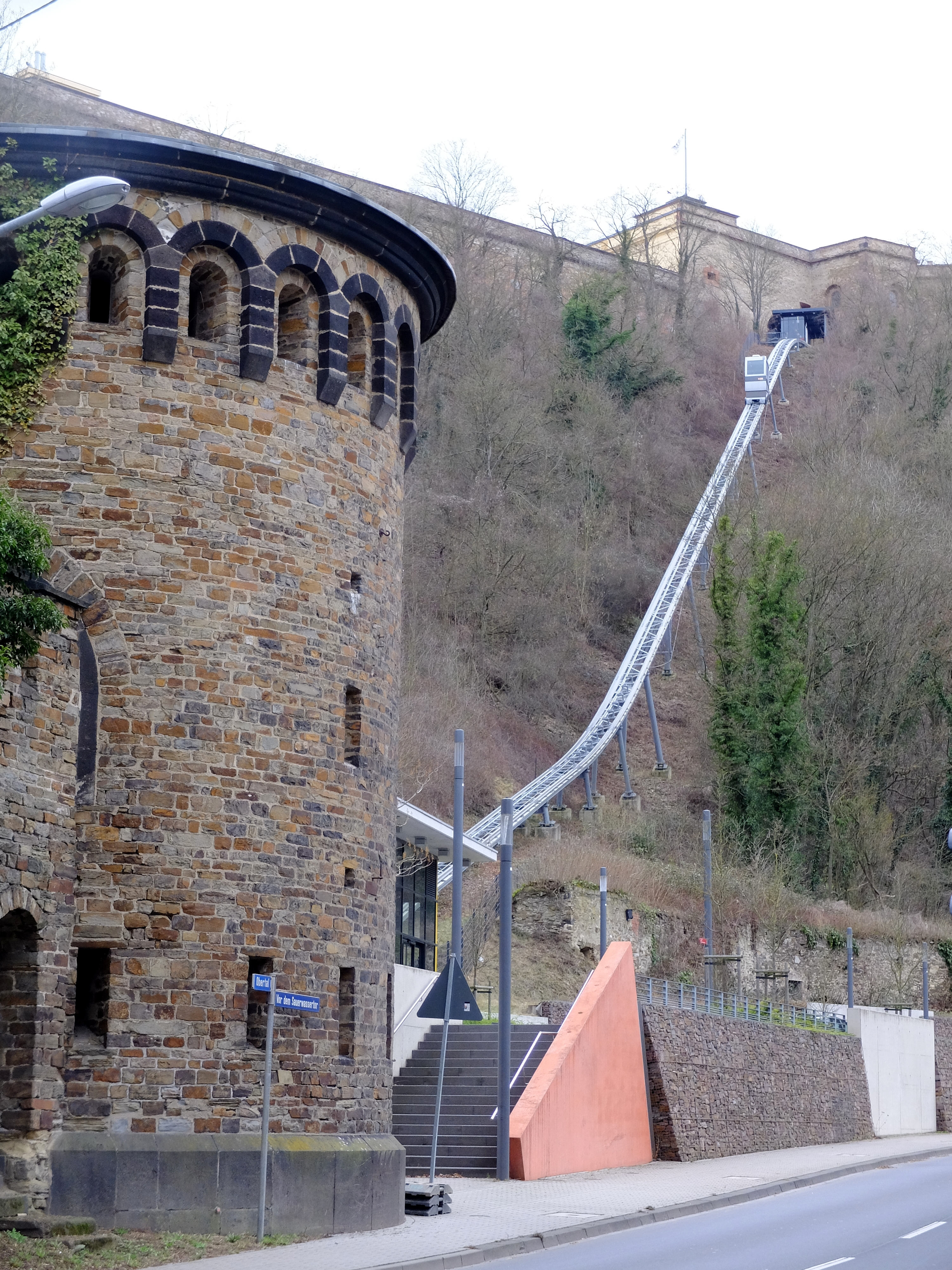 Festung Ehrenbreitstein. Lift zur Festung